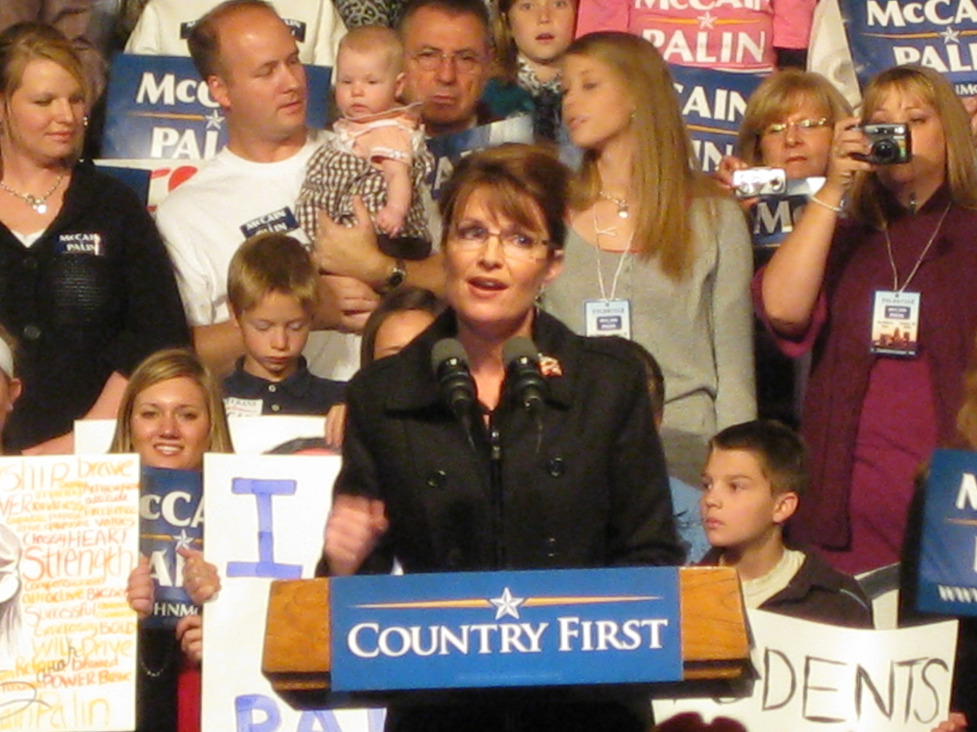 Sarah Palin campaigning in Des Moines